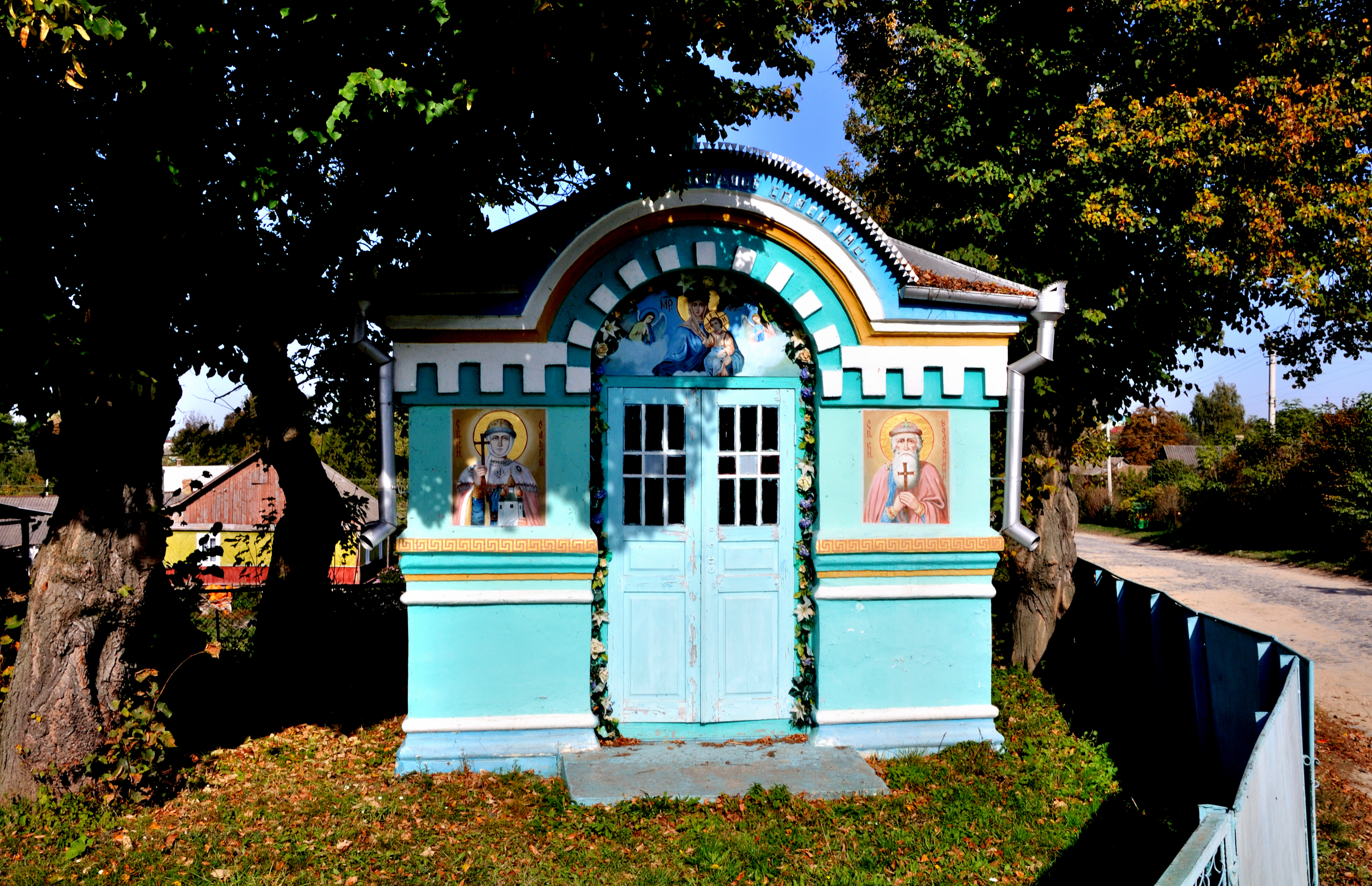 Каплиця Олександра Невського (мур.), с.Жорнів